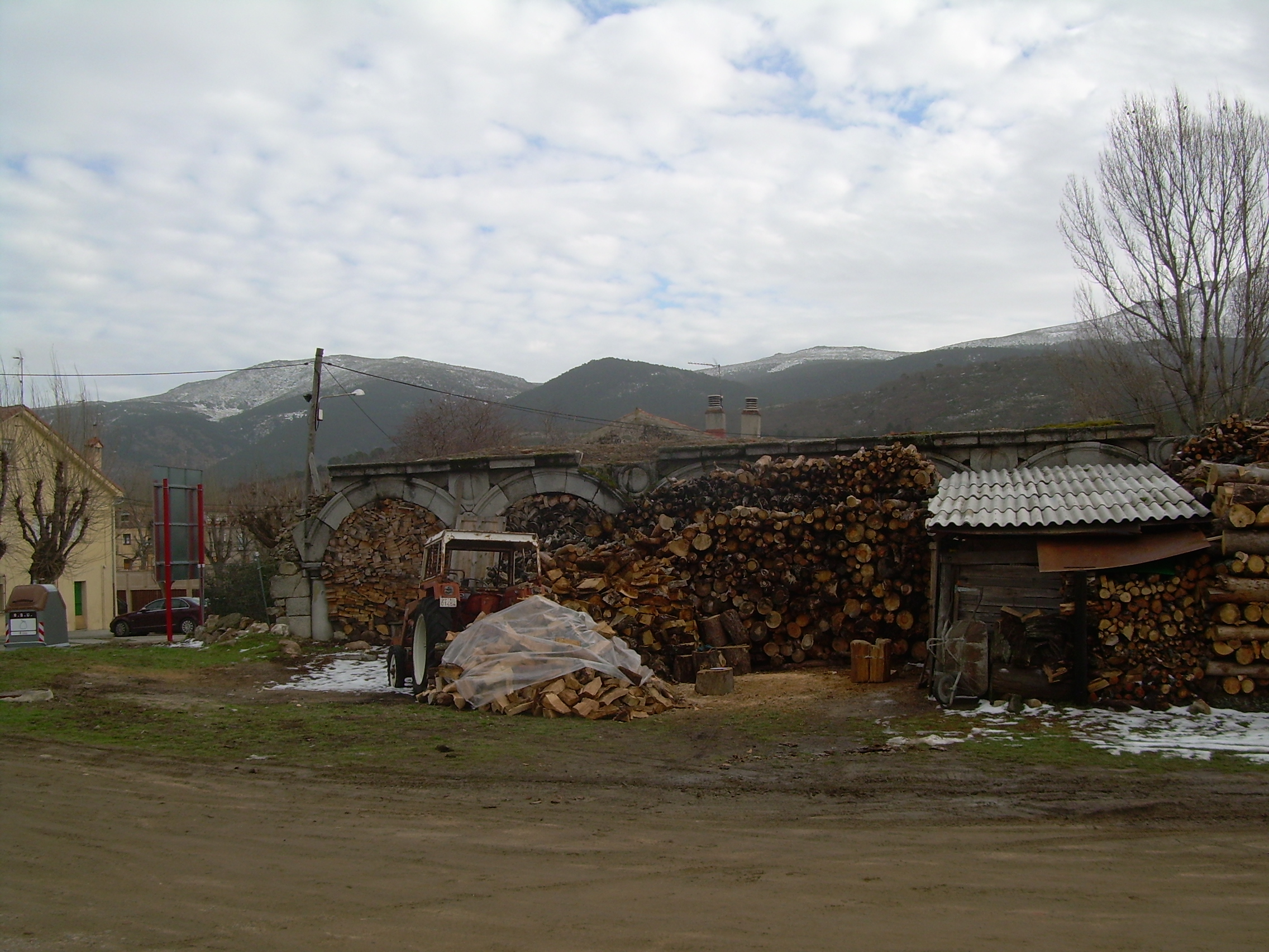 Esado actual de la arcada de la entrada principal de antiguo palacio.